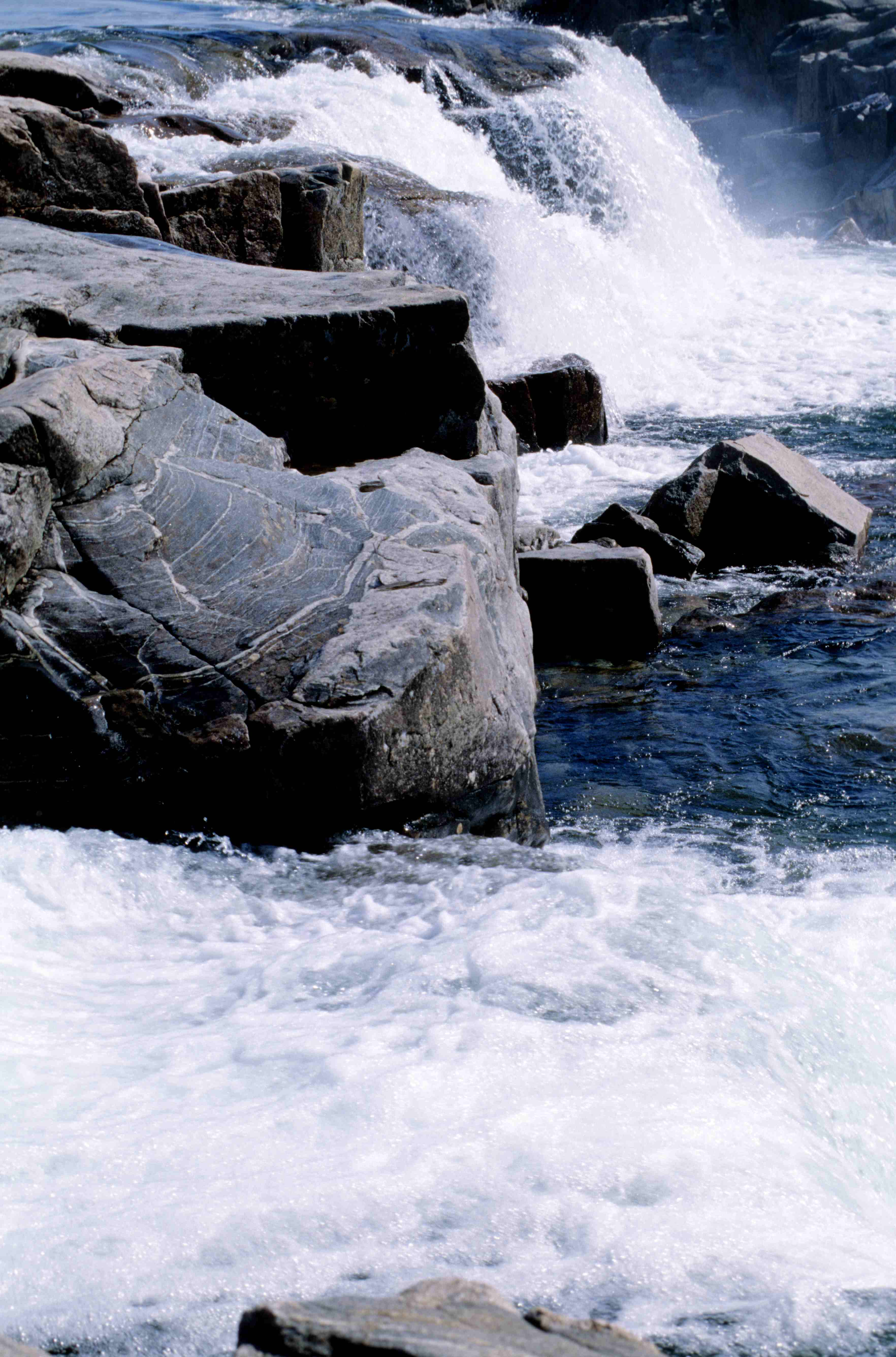 Sila River, 4th waterfall (Ukkusiksalik National Park, Nunavut, Canada)